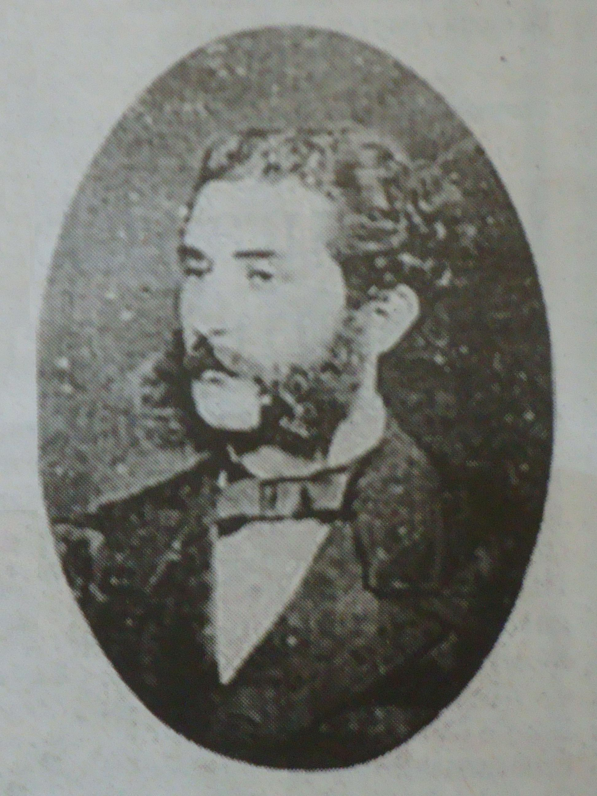 Daguerrotipo de Ignacio Gutiérrez Gómez en 1895, caudillo revolucionario tabasqueño.